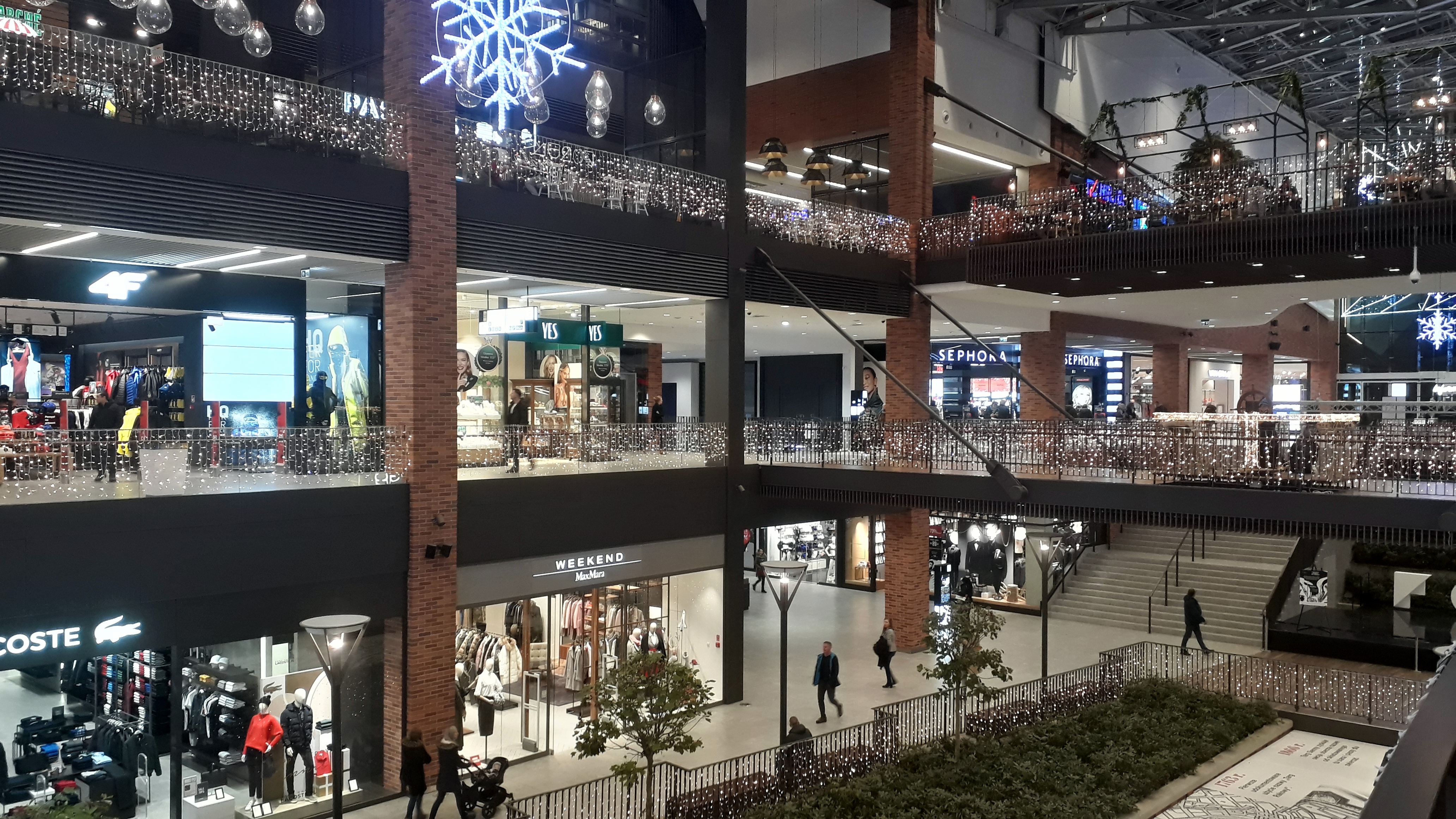 Centrum handlowe „Forum” w Gdańsku.